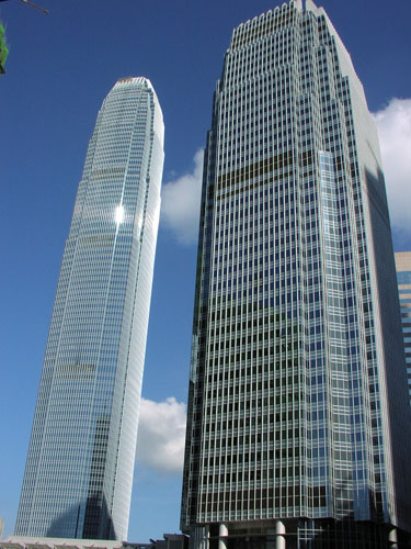 香港國際金融中心第1、2期（tksteven自行拍攝 2003年8月）